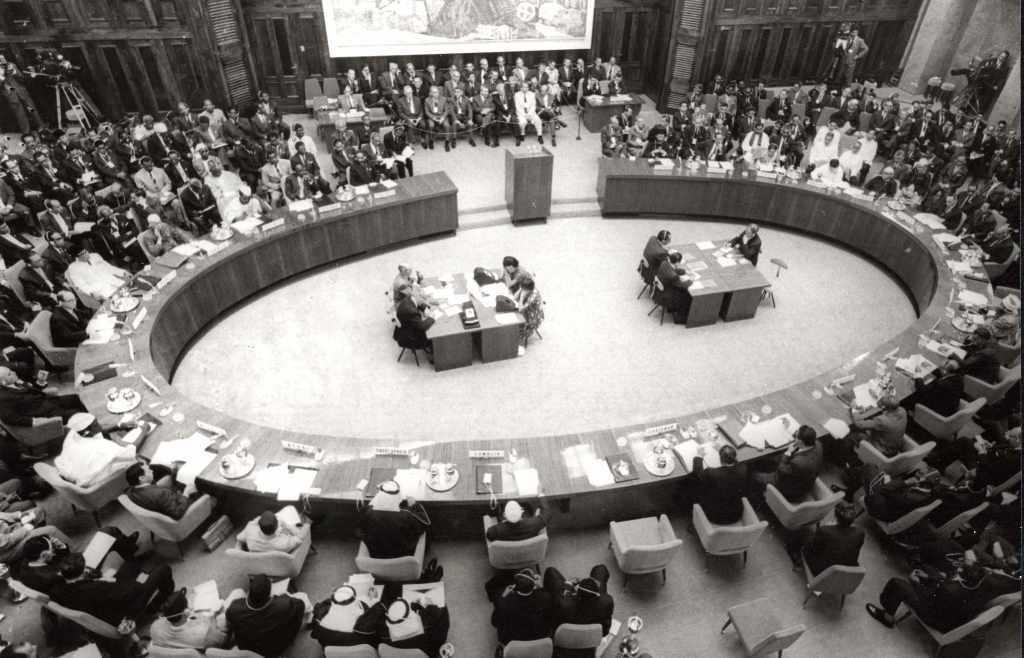 Srpski (latinica): Konferencija Pokreta nesvrstanih u Beogradu 1961. godine